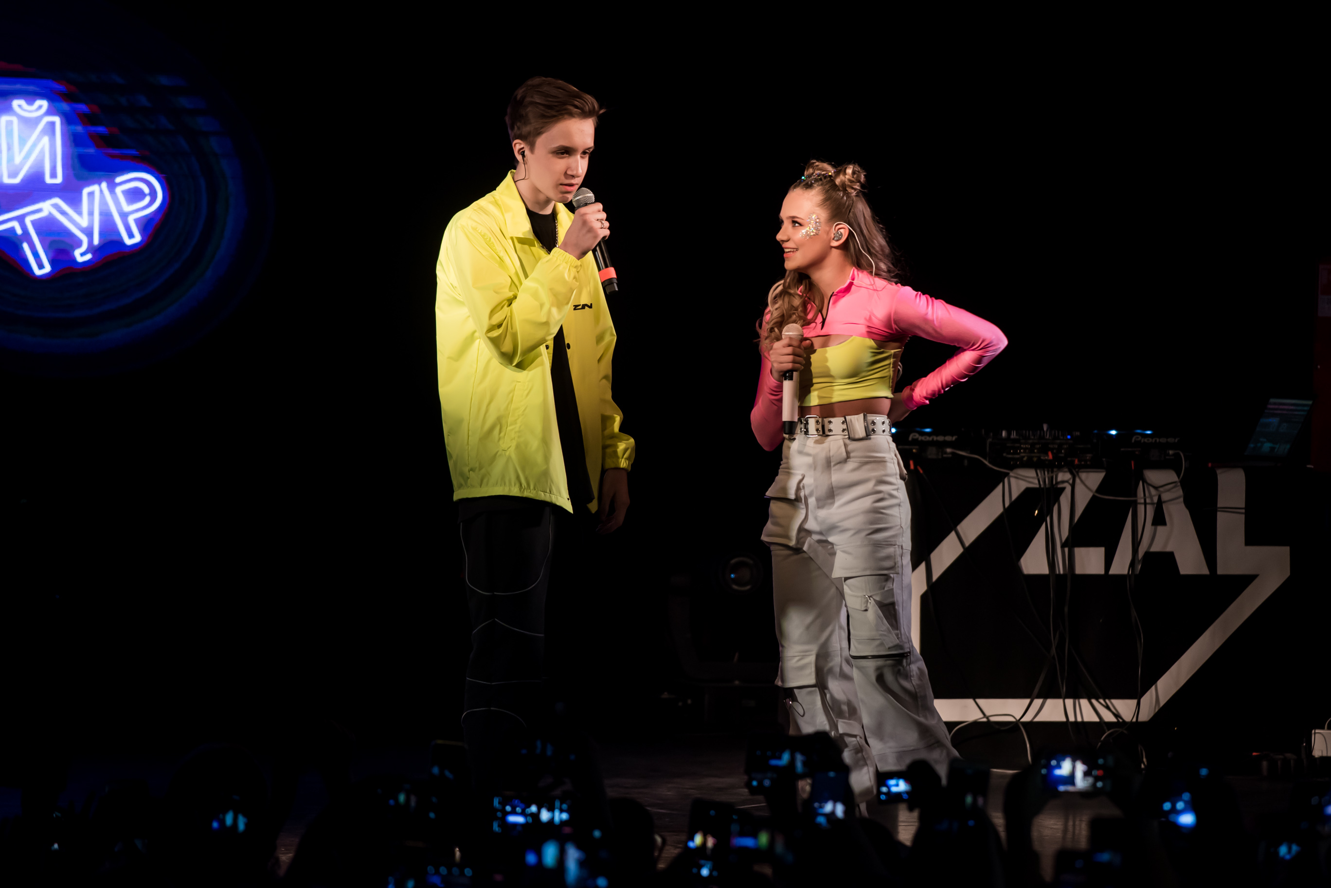 Миша Смирнов и Катя Адушкина на концерте «Малэнкий тур» в Петербурге (14.03.2020)